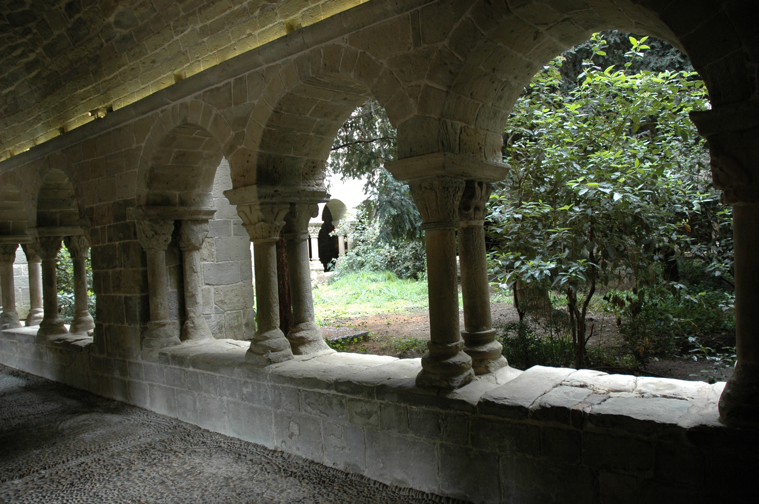 Sant Benet de Bages - Claustre